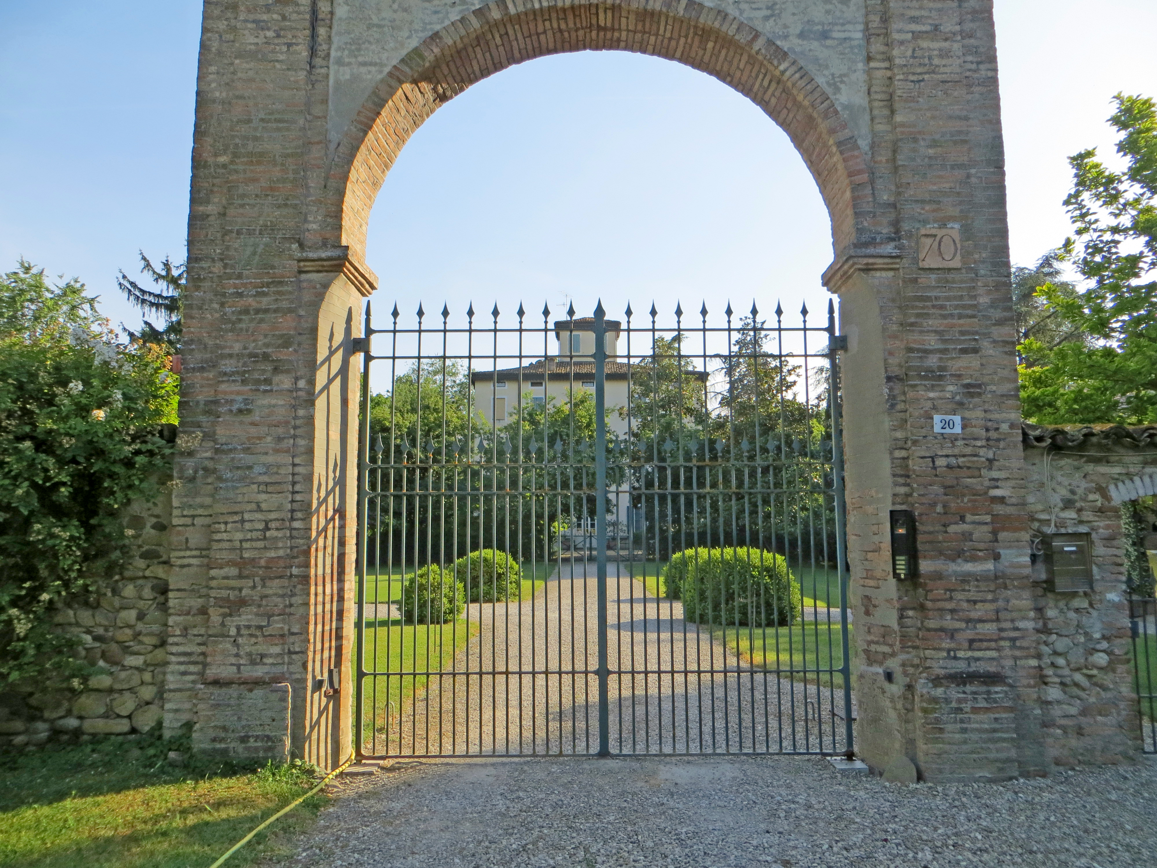 Villa Borri (Basilicagoiano, Montechiarugolo) - arco d'ingresso